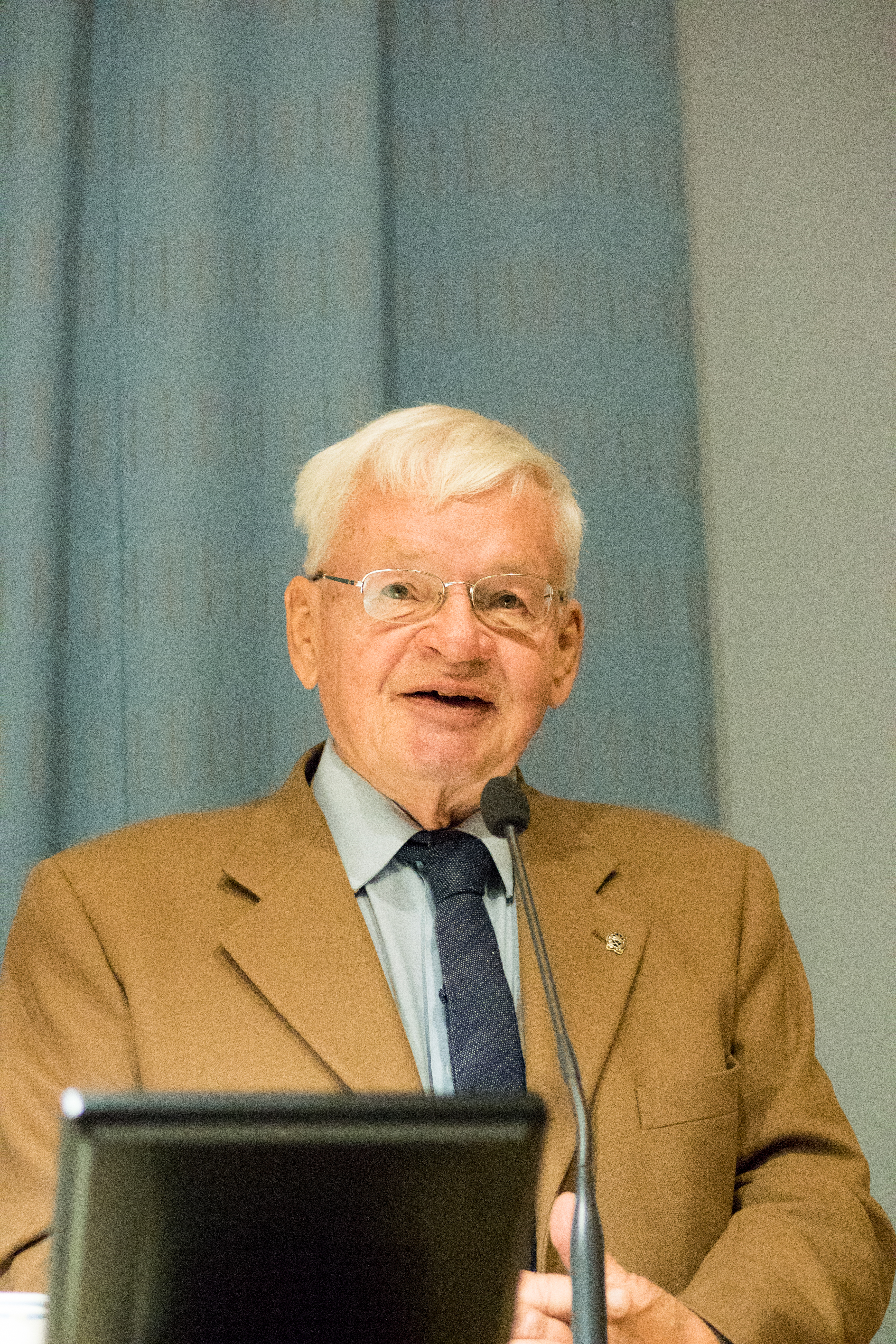 Sampo Ahto suomalainen kirjailija